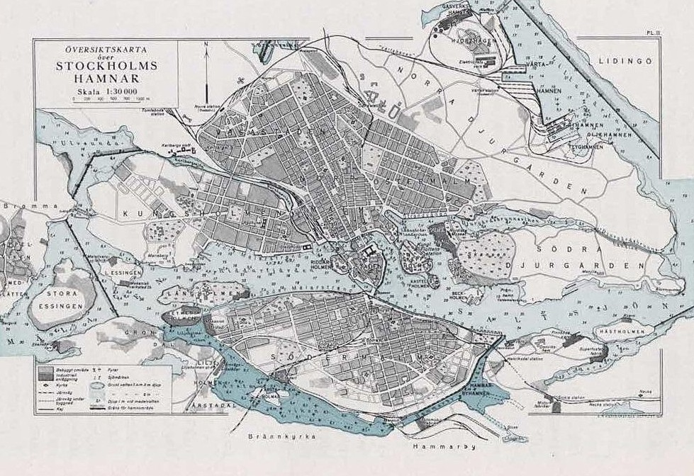 Stockholms hamnar översiktskarta 1929